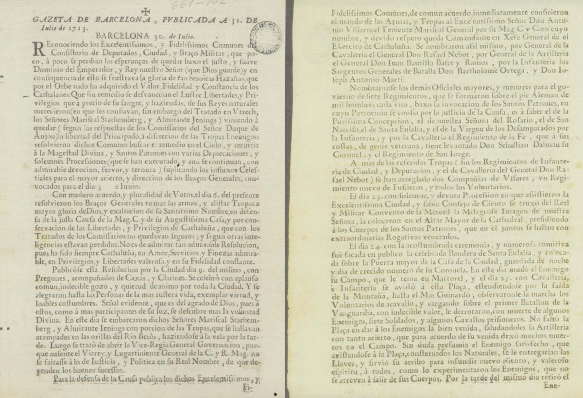 Gazeta de Barcelona - Diario del sitio de Barcelona. 1713